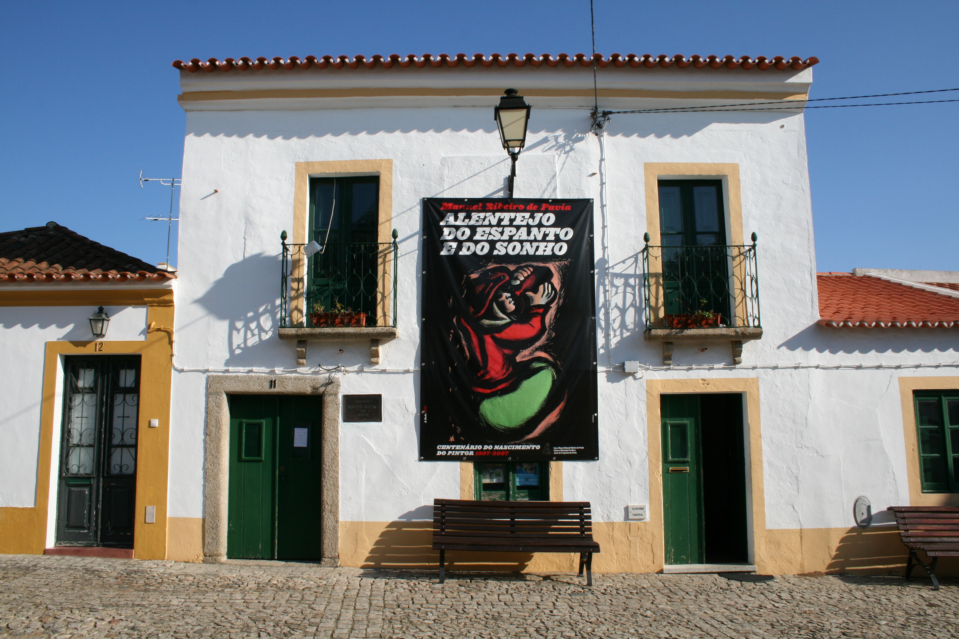 Fachada da Casa Museu Manuel Ribeiro de Pavia (Mora, Portugal)